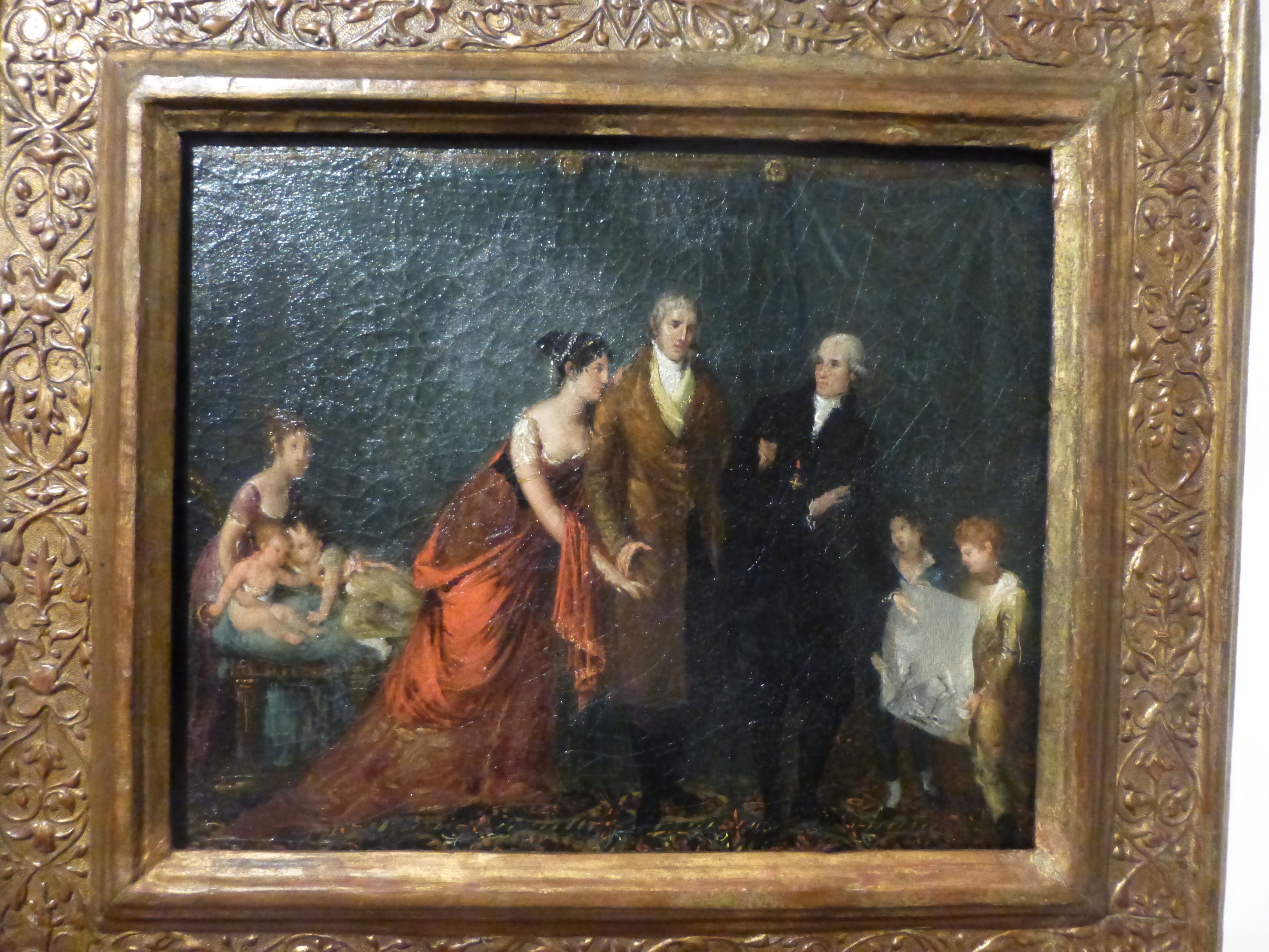 Museo di Roma a Palazzo Braschi. Antonio Canova mostra a Giovanni e Anna Maria Torlonia il bozzetto dell'Ercole e Lica. Il gruppo sarà poi posizionato in un'apposita esedra nel palazzo Torlonia di piazza Venezia.